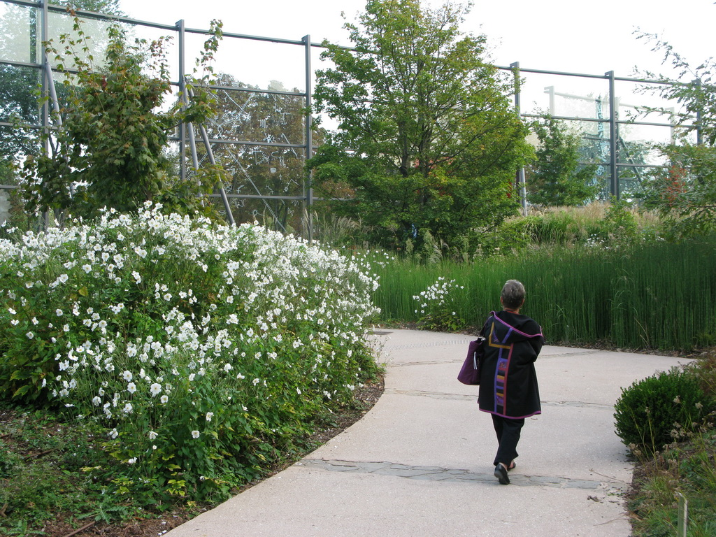 Quai Branly, jardin nord